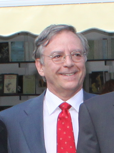 Los rectores de las Universidades Públicas Madrileñas, la UNED y la periodista Paloma Tortajada, 2010, Feria del Libro, Madrid, España.